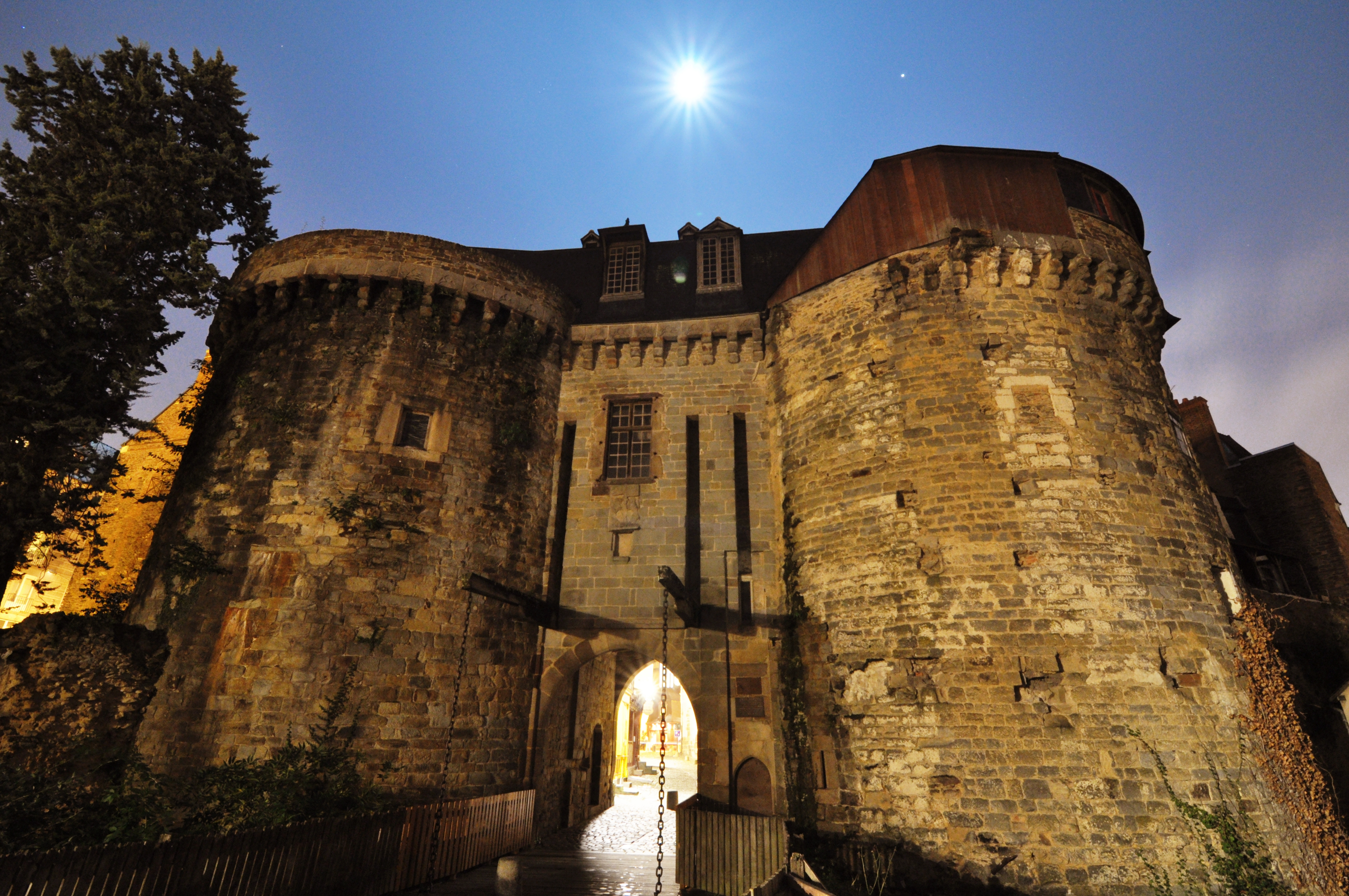 Antiga entrada da muralha que cercava Rennes na direção de Mordelles.